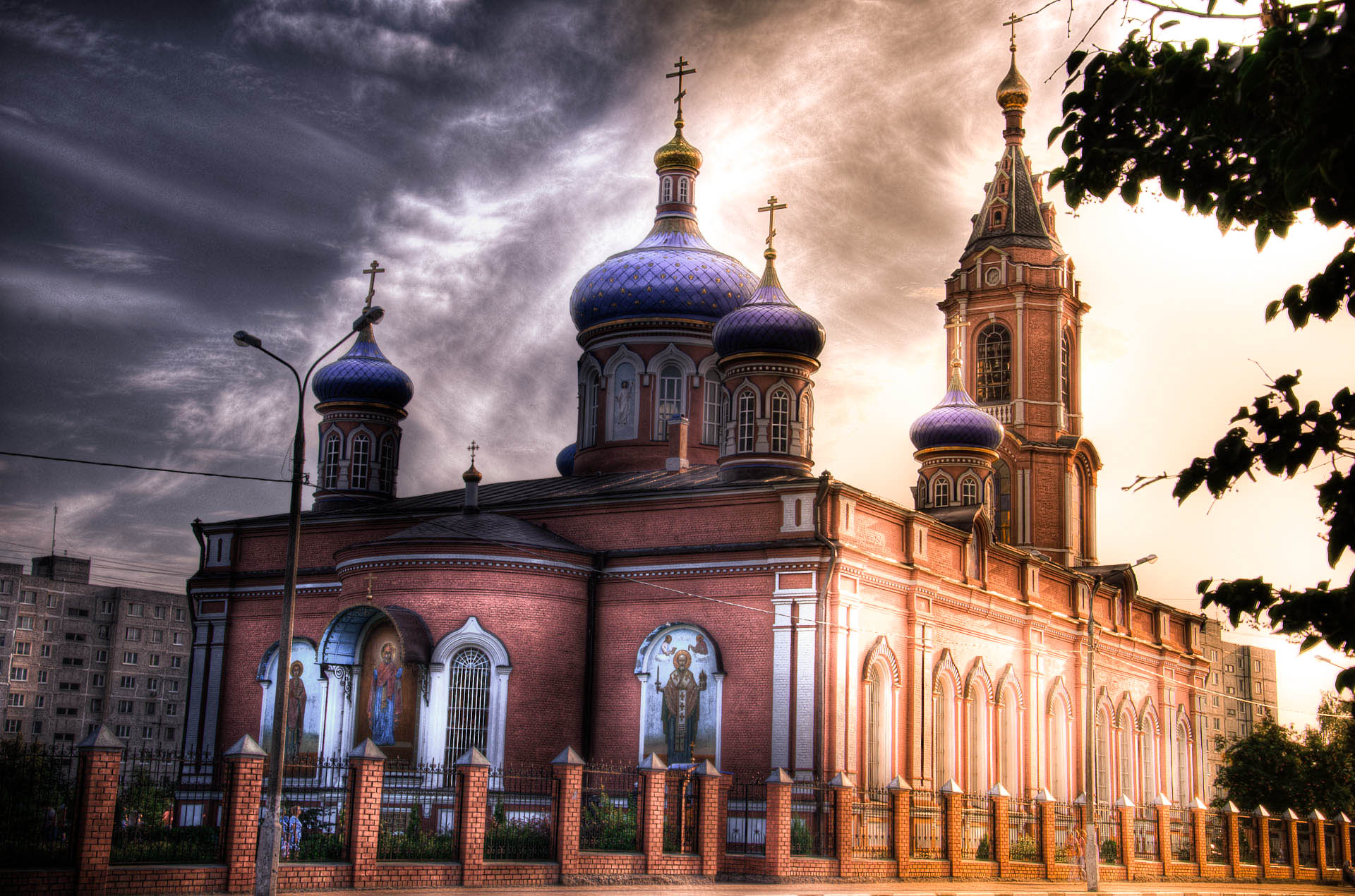 Собор Рождества Пресвятой Богородицы (Москва и Московская область, Орехово-Зуево, улица Володарского, 20)